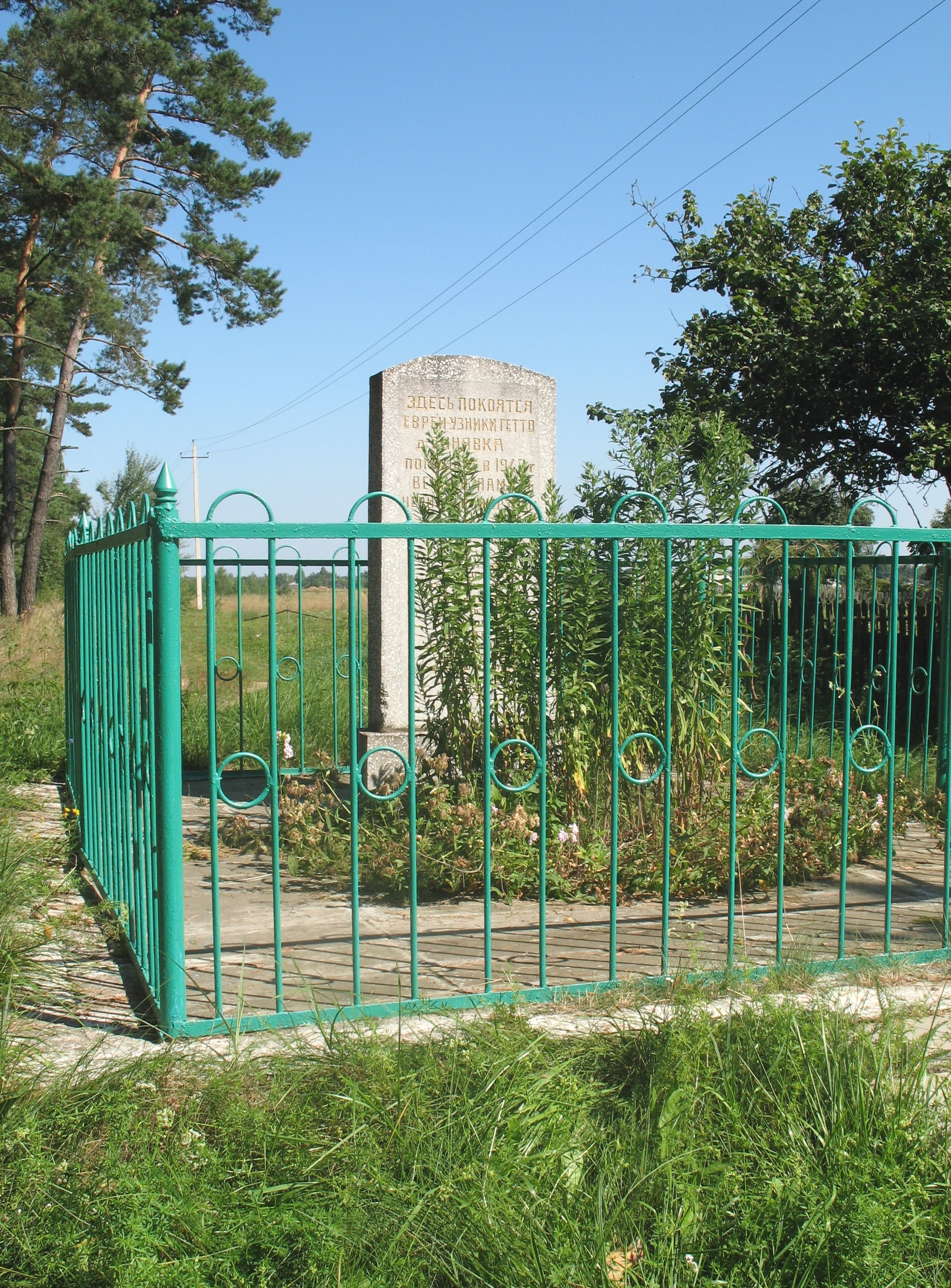 Памятник на братской могиле на месте массового убийства в августе 1943 года евреев деревни Синявка (Минская область, Клецкий район, Синявский сельский Совет). Находится на окраине деревни Нарешевичи этого же сельсовета. Стела из гранита установлена в 1995 году.